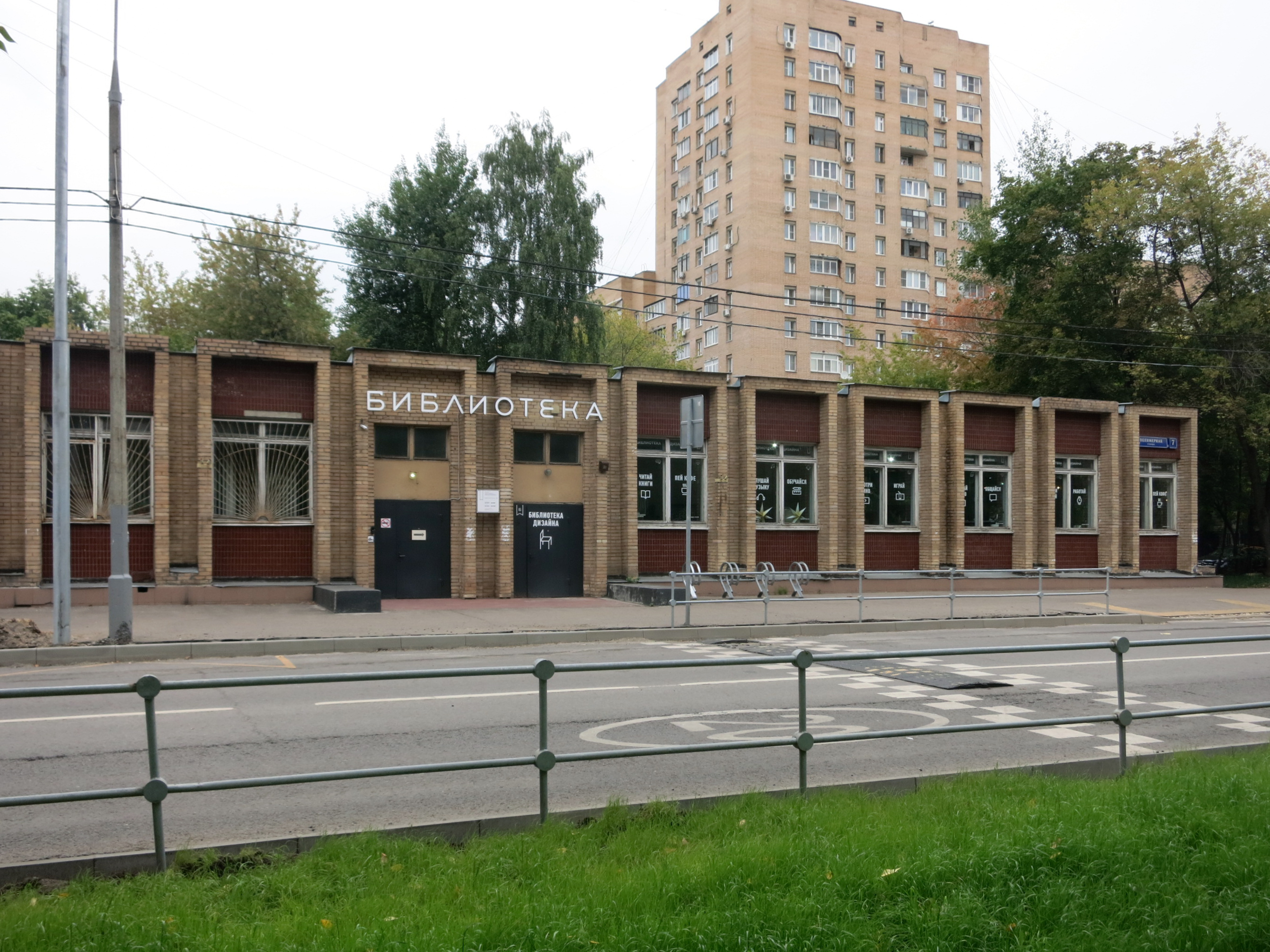 Библиотека № 95. Адрес: Полимерная улица, д. 7, строение 2 (Москва) Оформлена и обставлена Клубом промышленных дизайнеров, после чего получила своё неномерное название — Библиотека дизайна.